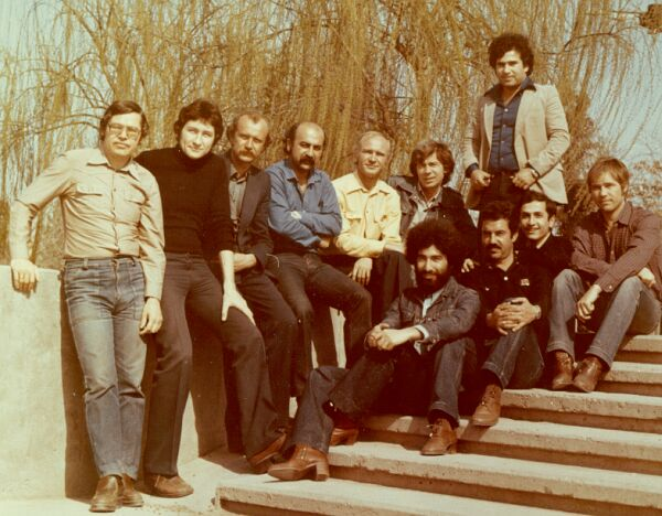 Звездный состав "Гунеша", 1980 г.